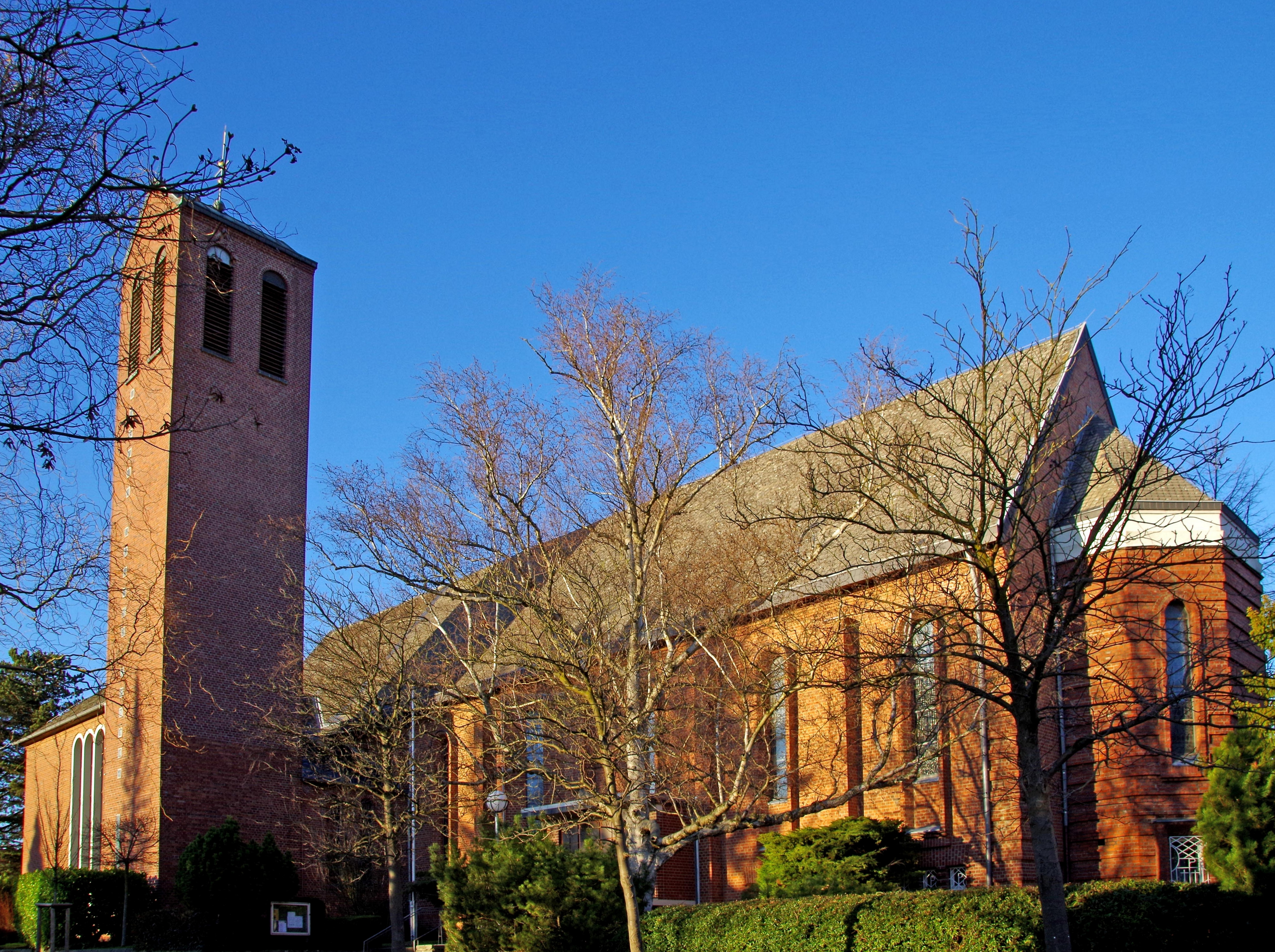 Christus König (Busch), Südostseite